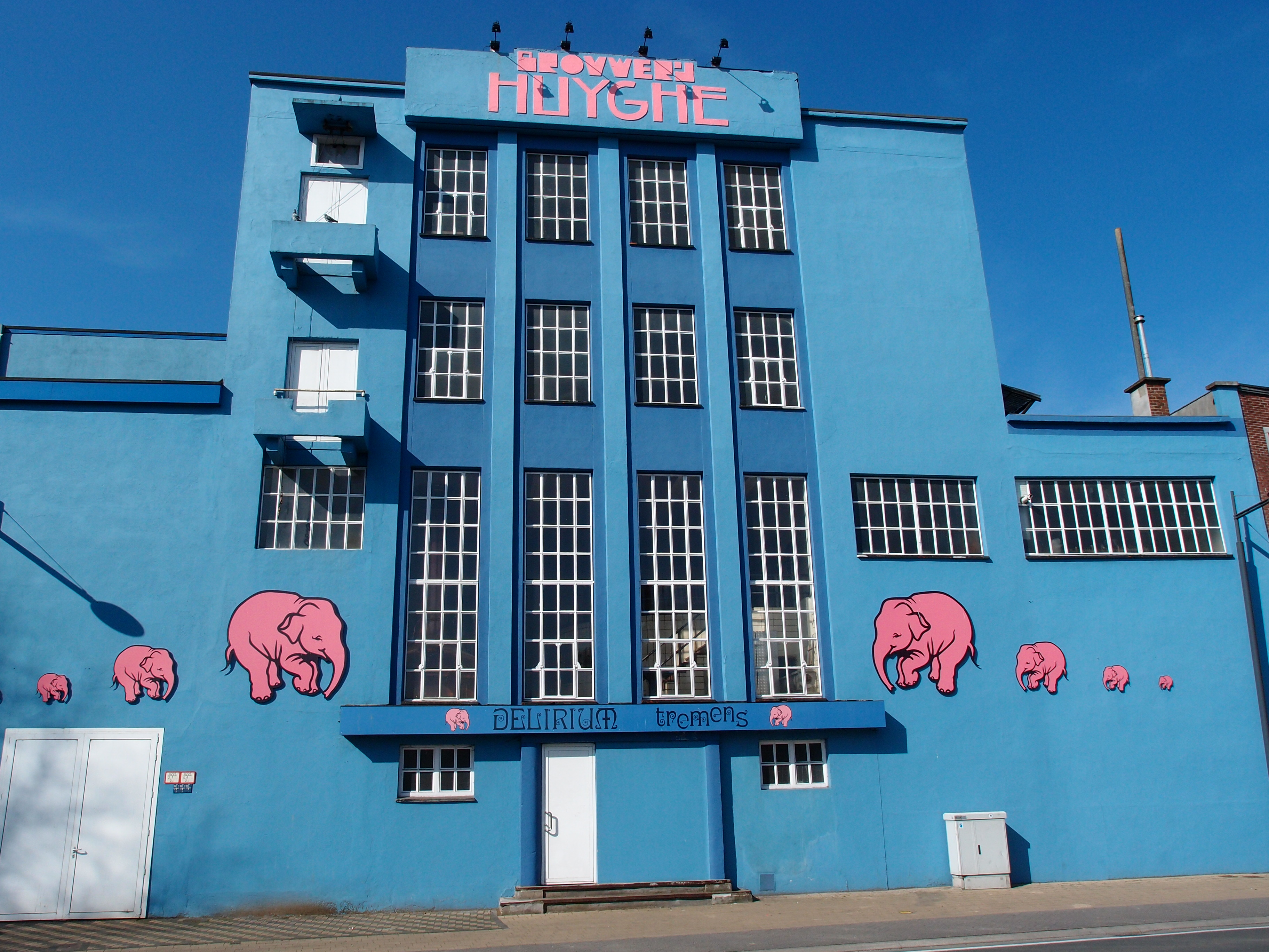 Brauerei Huyghe (alter Teil) in Melle (Belgien) Datum: 08.03.2014 Urheber: M. Pfeiffer alias Benutzer:Gordito1869 Quelle: privates Fotoarchiv des Urhebers